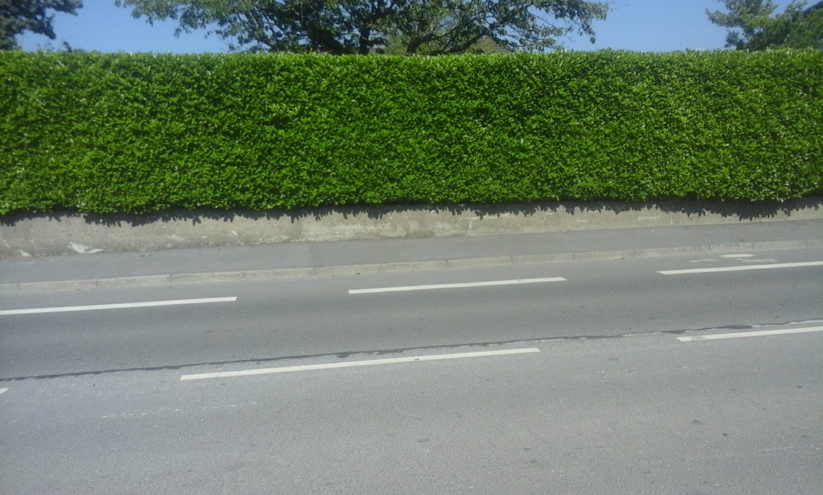 Haie taillée de lauriers palme (Prunus laurocerasus) en France.